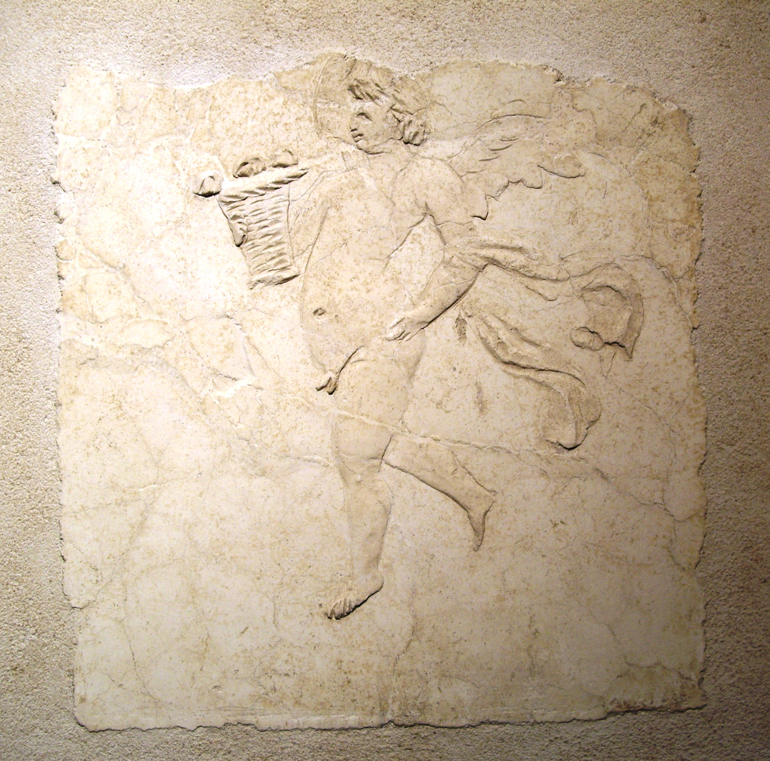 Stucchi di Villa Petraro